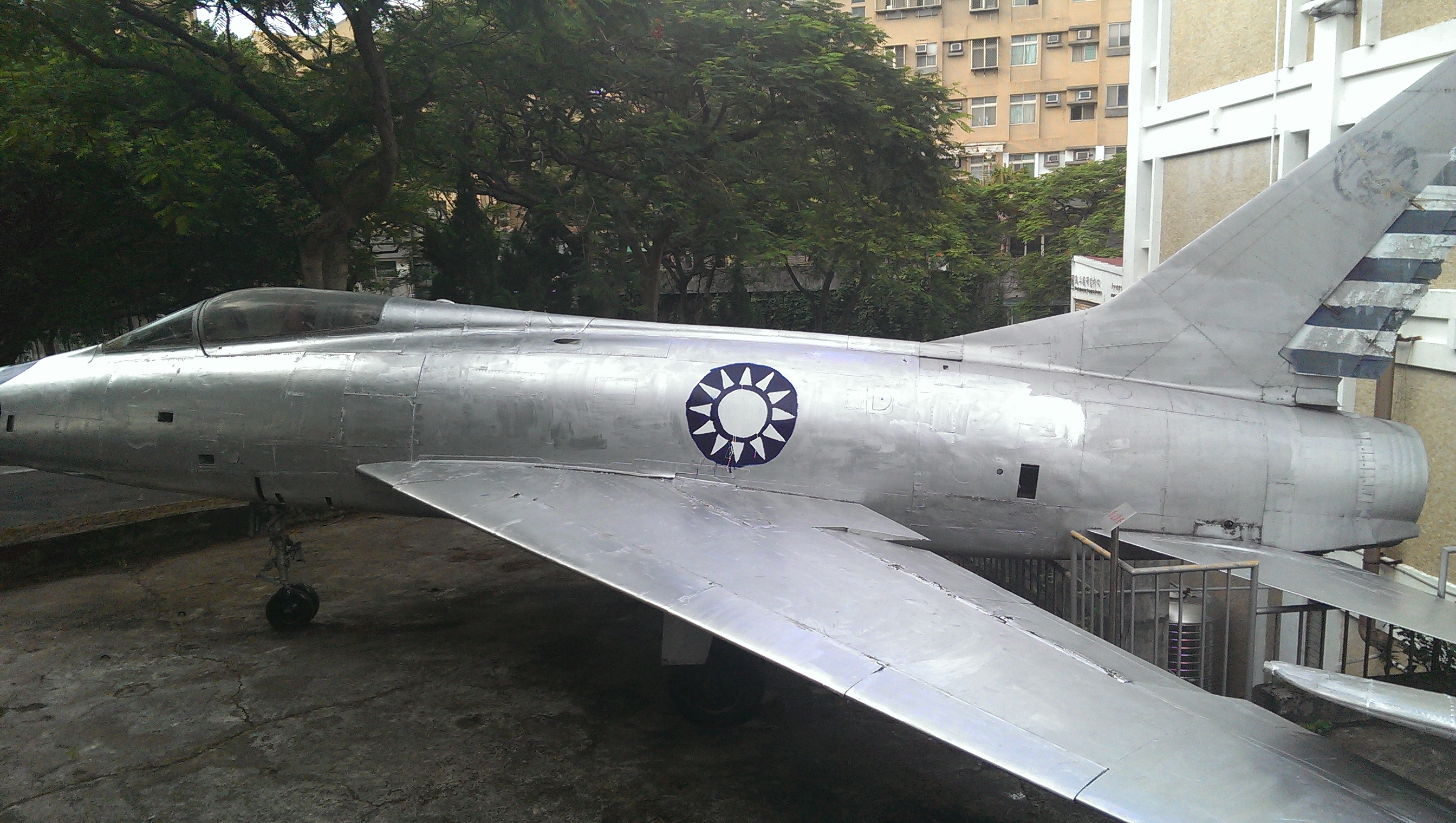 陳列於淡江大學海事博物館旁的中華民國空軍F-100A 0214，曾服役於2聯隊11大隊41中隊、2聯隊11大隊48中隊；原美國空軍53-1571 F-100A-16-NA。